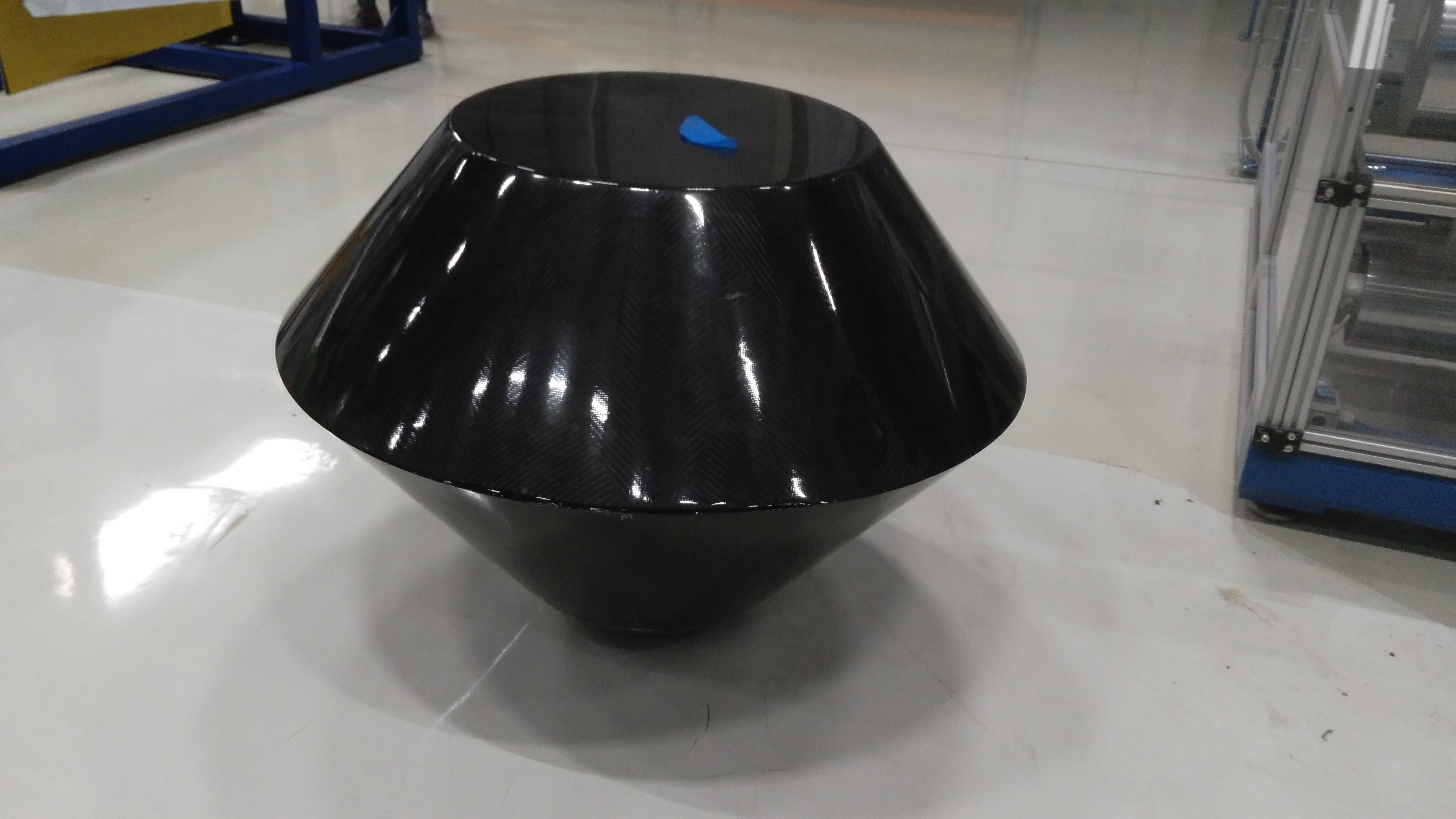 Углепластиковая неваляшка (Ванька-встанька)